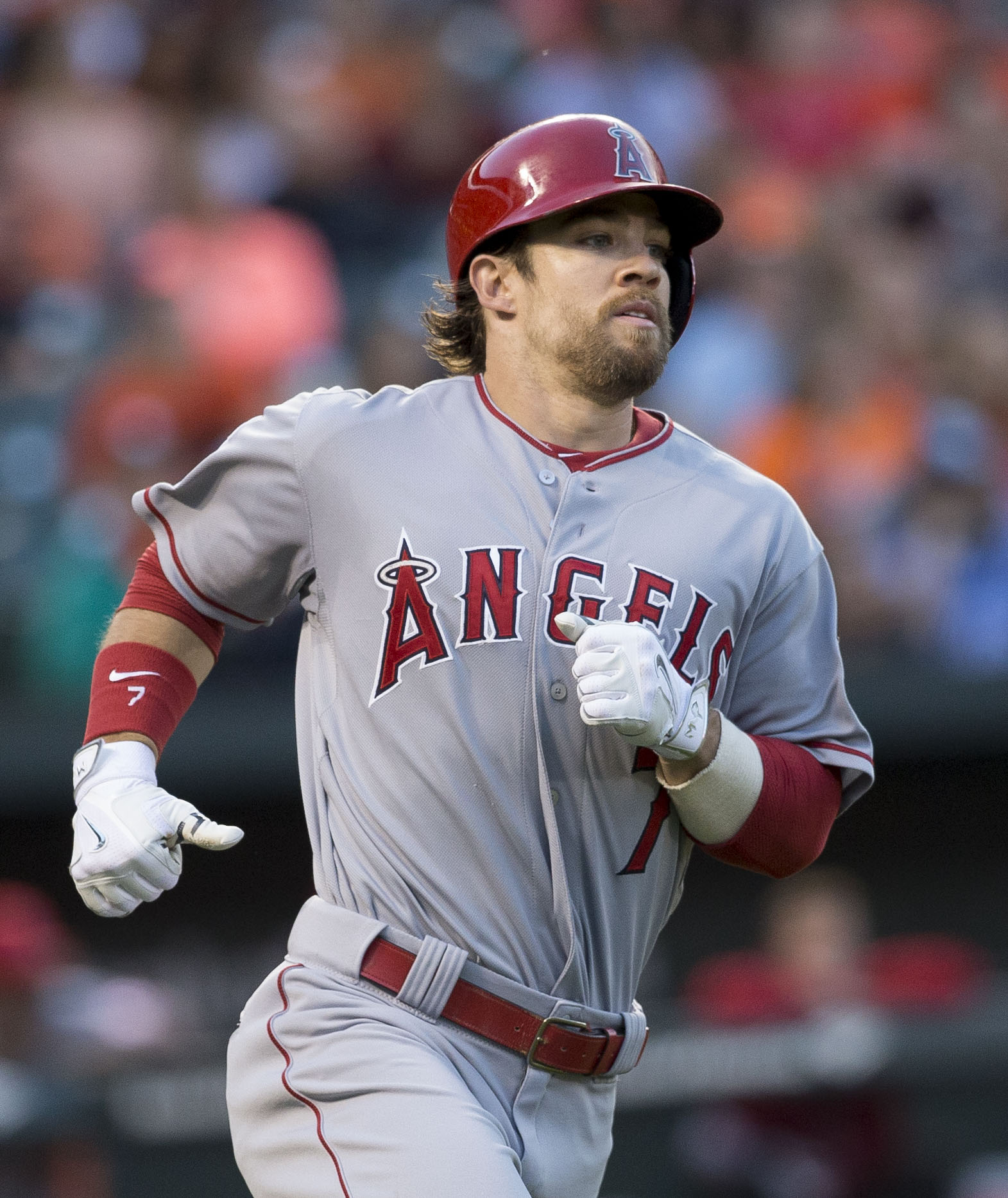 Angels at Orioles 5/15/15